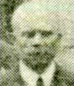 Porträtausschnitt von Andreas Knack aus einem Zeitungsfoto einer Gruppenaufnahme